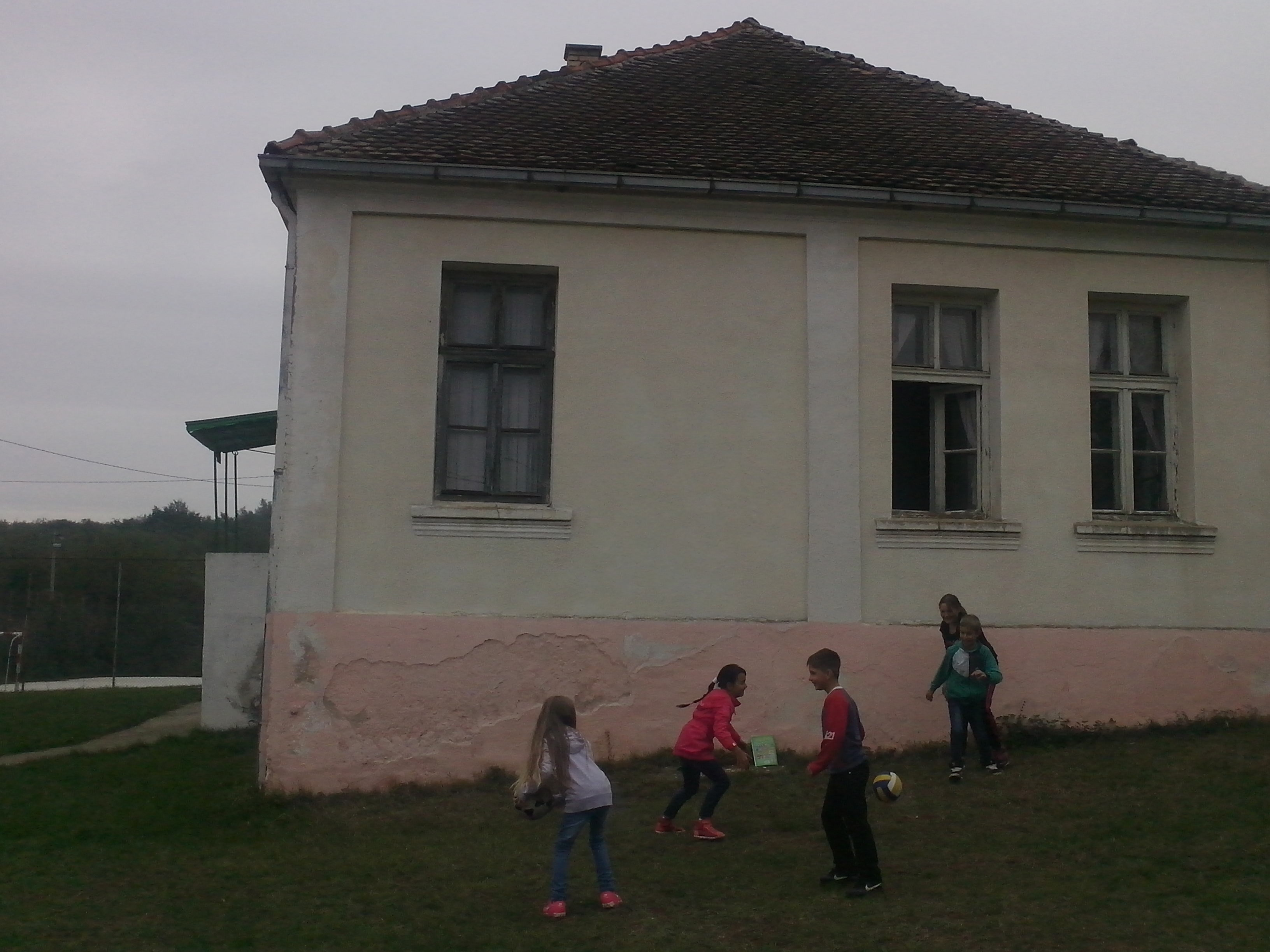 Школа у Врановцу